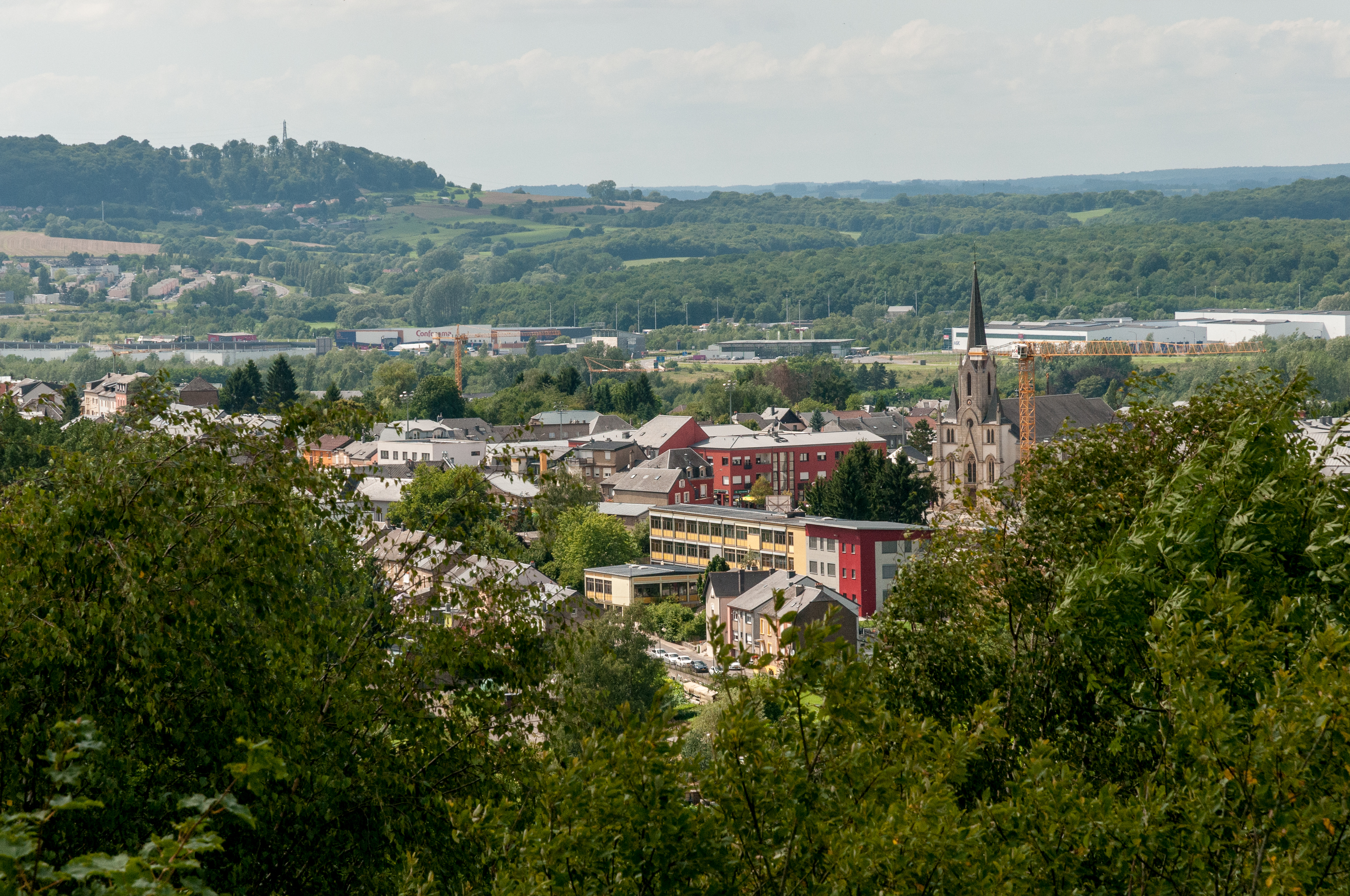 Eng Vue vum Mirador de Lamadelaine op Rodange.